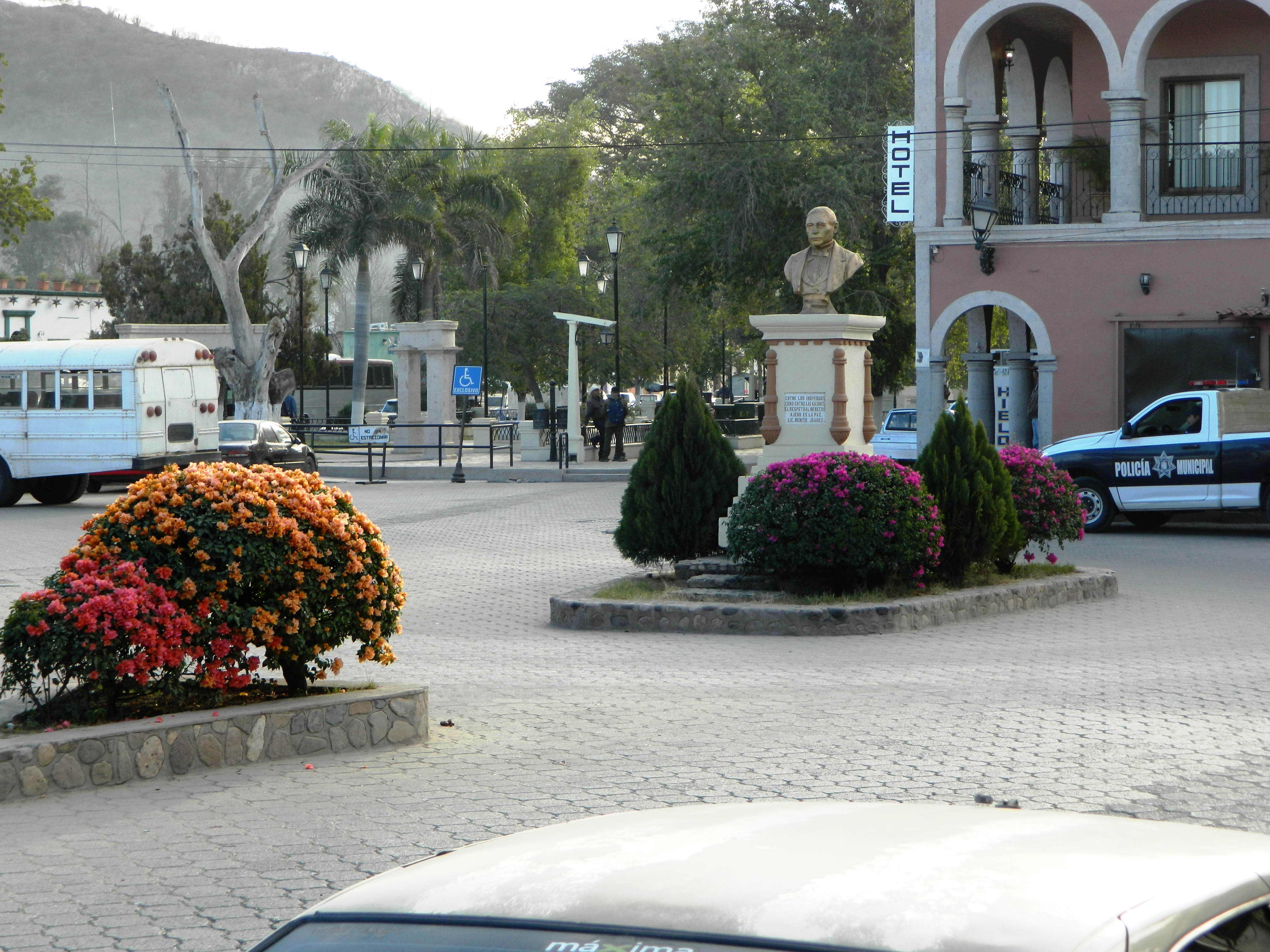 Monumento a Juarez y Bugambilias Alameda Alamos 2014